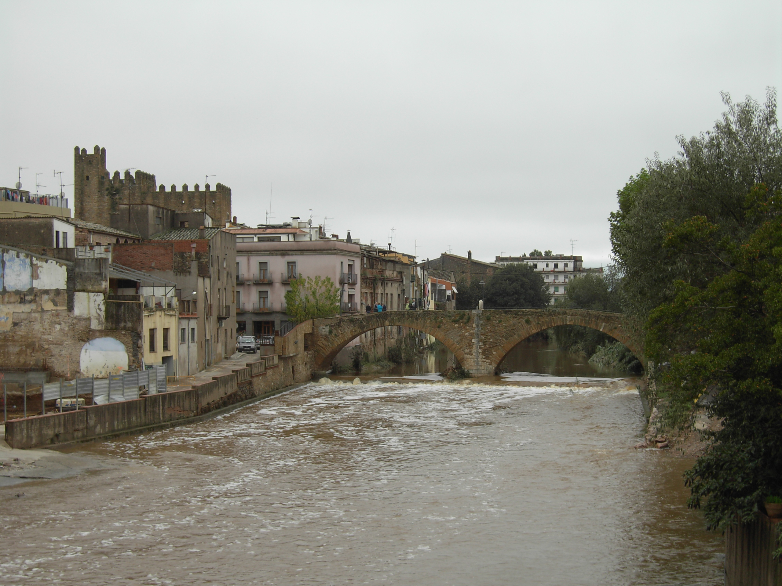 River Daró on La Bisbal d'Empordà, Catalonia (Spain)